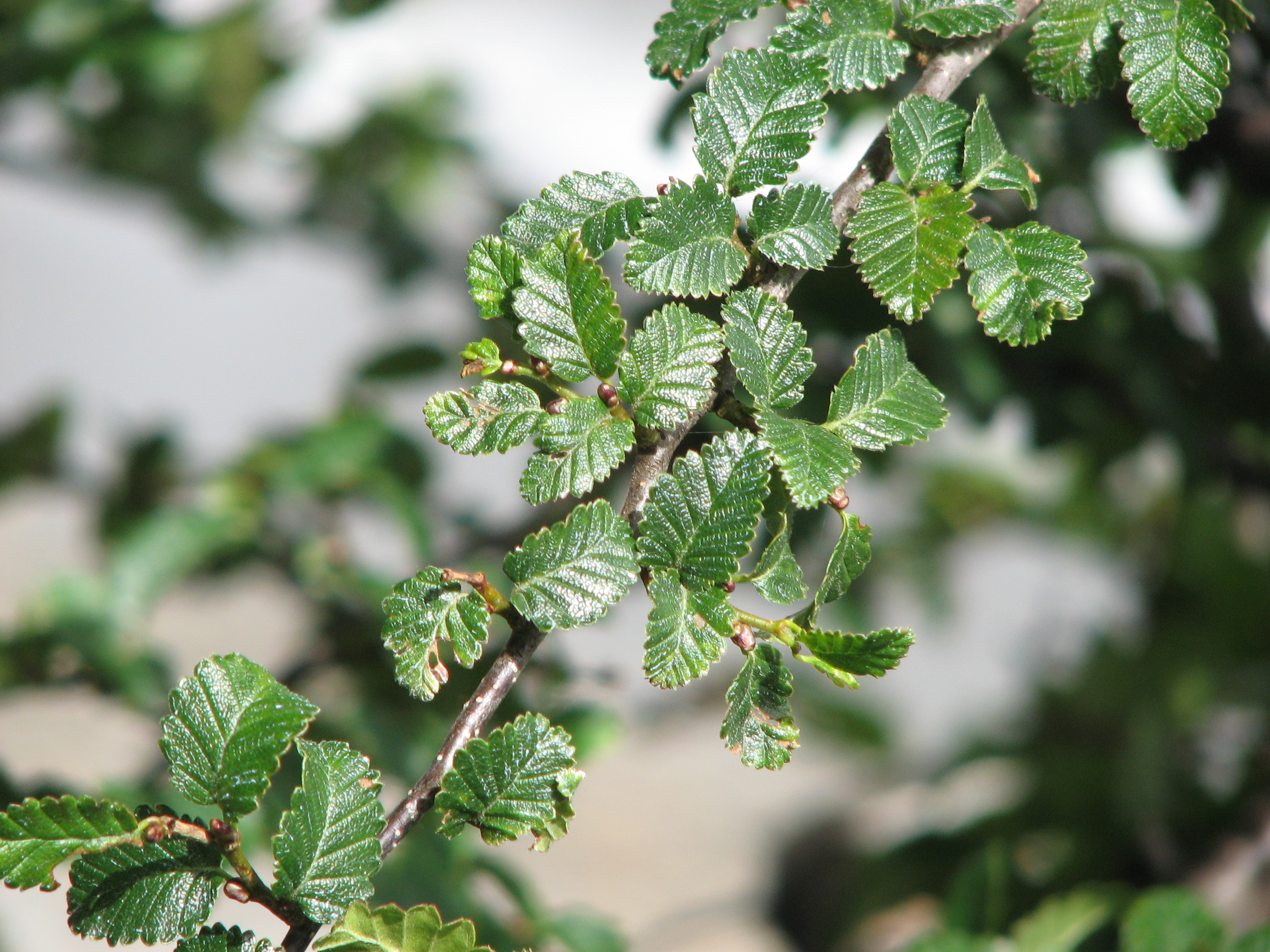 Hojas de lenga "Nothofagus pumilio"